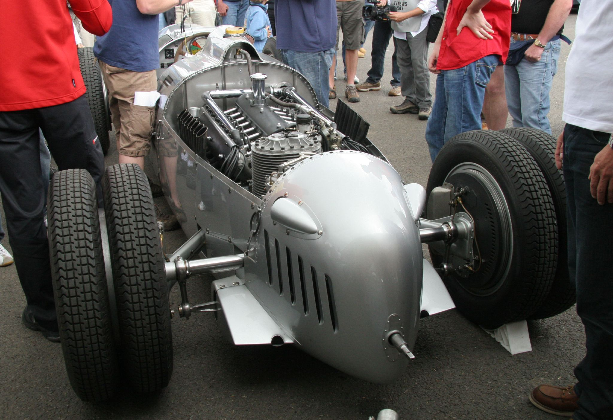 Auto Union Type C Bergwagen 1936